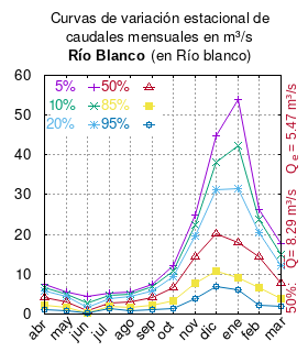 Curva de Variación Estacional Río Blanco en río Blanco. # cita publicación # | apellido = Dirección General de Aguas # | nombre = # | enlace-autor = Ministerio de Obras Públicas (Chile) # | título = Diagnóstico y clasificación de los cursos y cuerpos de agua según objetivos de calidad. Cuenca del río Aconcagua # | ubicación = Santiago de Chile # | editorial = Ministerio de Obras Públicas (Chile) # | año = 2004 # | edición = # | url = # | ref = harv # Tabla 4.2: Río Blanco en río Blanco (m3/s) pág. 50 mes 5% 10% 20% 50% 85% 95% abr 7.404 6.696 5.837 4.197 2.176 0.989 may 5.457 4.949 4.333 3.157 1.708 0.857 jun 4.409 2.751 1.645 0.726 0.349 0.257 jul 5.213 4.615 3.948 2.850 1.804 1.334 ago 5.530 5.004 4.367 3.150 1.650 0.769 sep 7.526 6.803 5.927 4.253 2.190 0.979 oct 12.044 10.861 9.427 6.688 3.314 1.332 nov 24.757 22.453 19.662 14.328 7.758 3.899 dic 44.824 38.292 31.238 20.210 10.678 6.881 ene 53.982 42.381 31.614 18.056 9.057 6.039 feb 26.337 23.670 20.440 14.266 6.661 2.194 mar 17.707 14.927 12.028 7.650 3.762 1.997